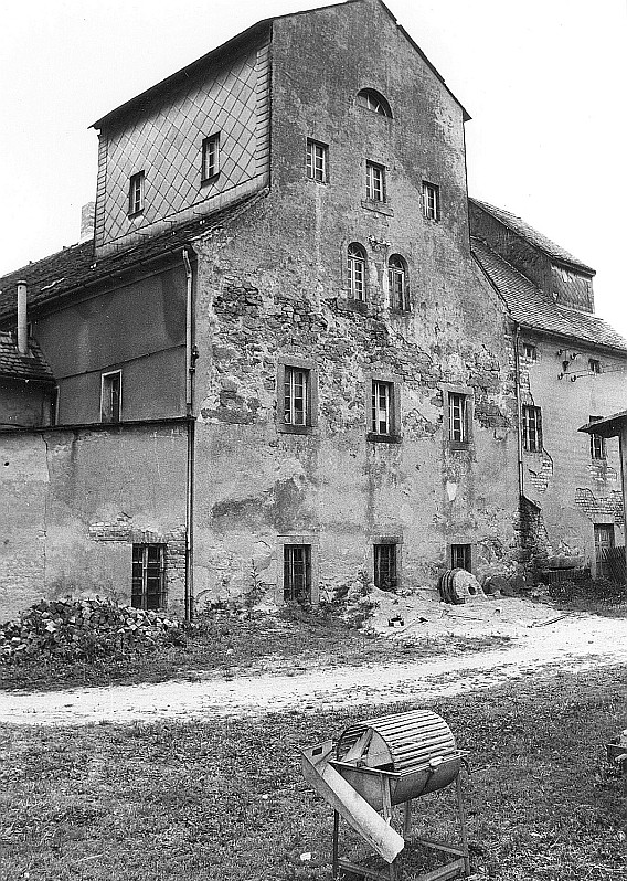 Original image description from the Deutsche Fotothek Hochkirch-Breitendorf. Ober- oder Lowkemühle